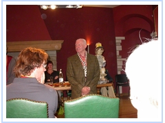 Gentse stroppendrager, eigen foto, GFDL